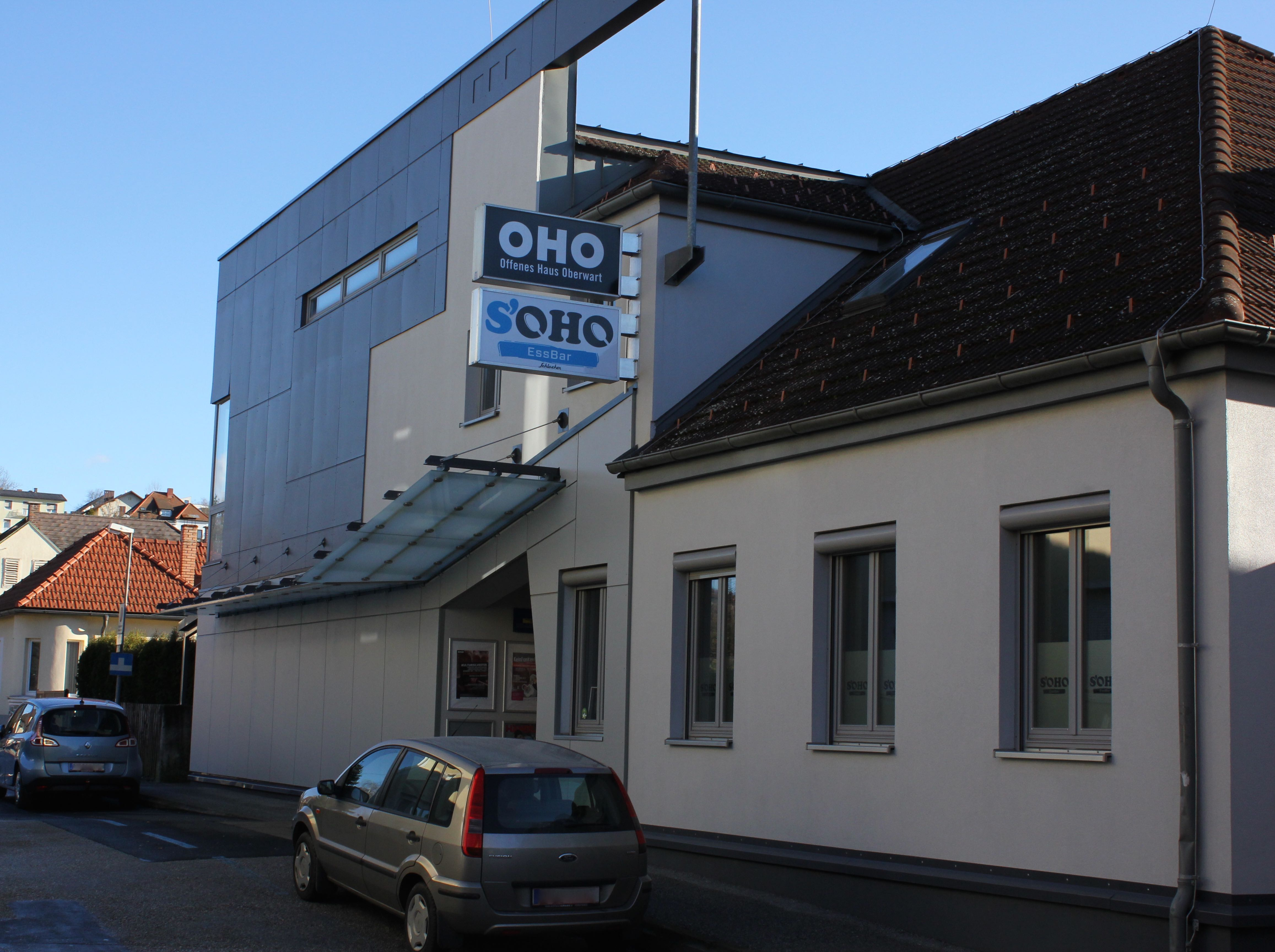 Offenes Haus Oberwart (OHO)